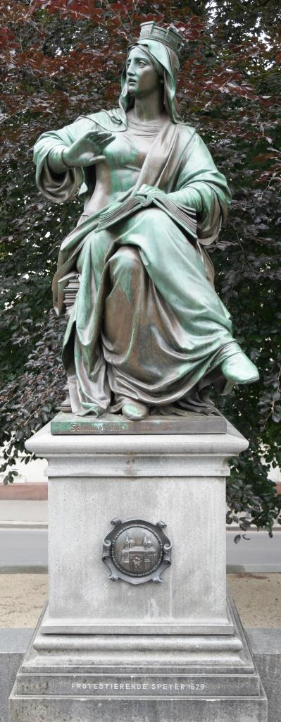 Allegorie Die protestierende Speyer, mit Bezug auf den Reichstag von Speyer 1529, von Johannes Schilling; Teil des Lutherdenkmals in Worms